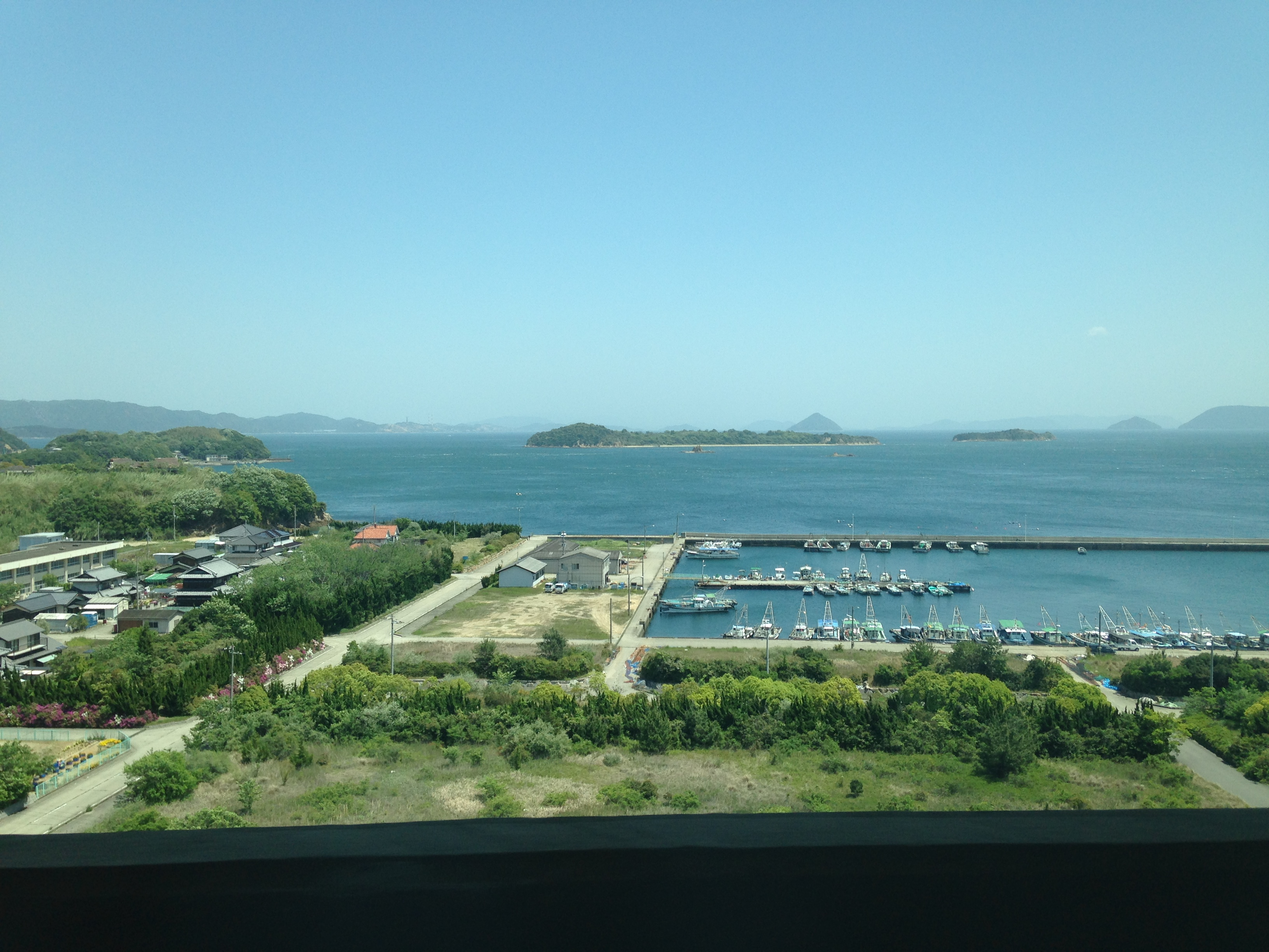 櫃石島を通過する瀬戸大橋線の列車内より望む景色